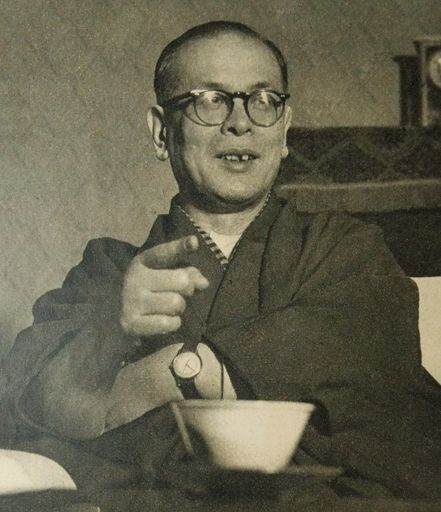 田谷充実